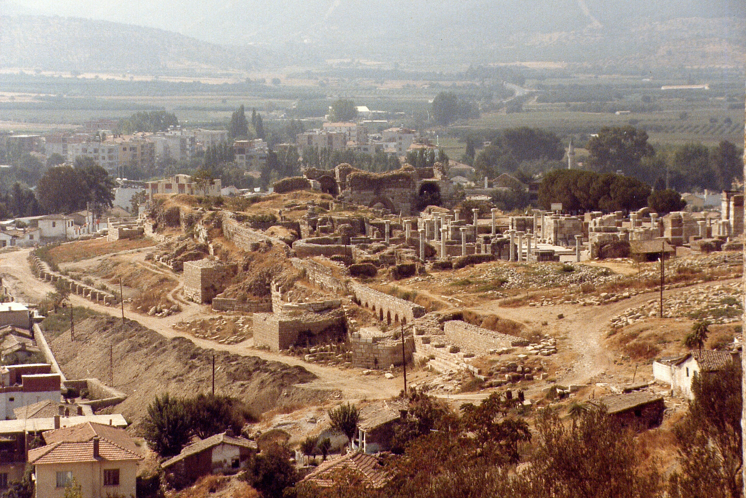 Blick auf die Johanneskirche von Ephesus, von der Zitadelle von Selçuk, Westtürkei